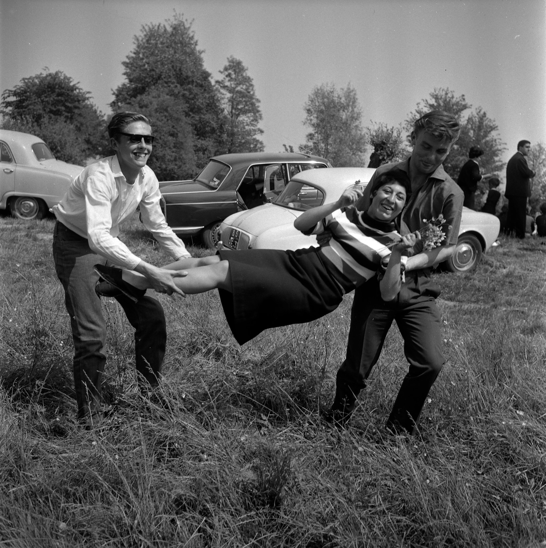 Village de Bourg-Saint-Bernard (Haute-Garonne). Le 18 Mai 1964. Vue d'un groupe de jeunes dans le pré de la Fadaise.